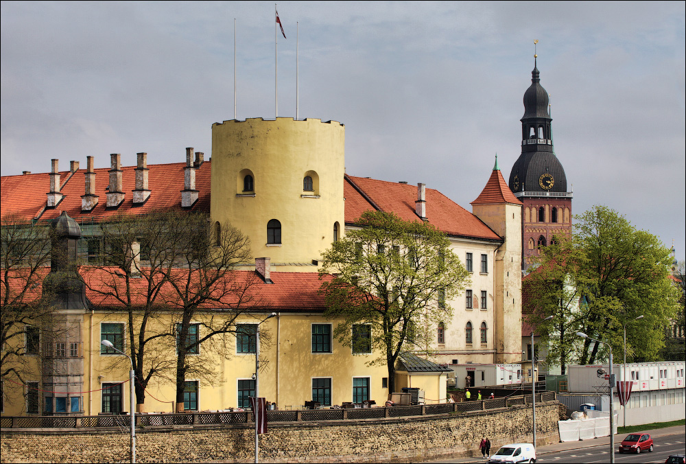 Рыжскія замалёўкі